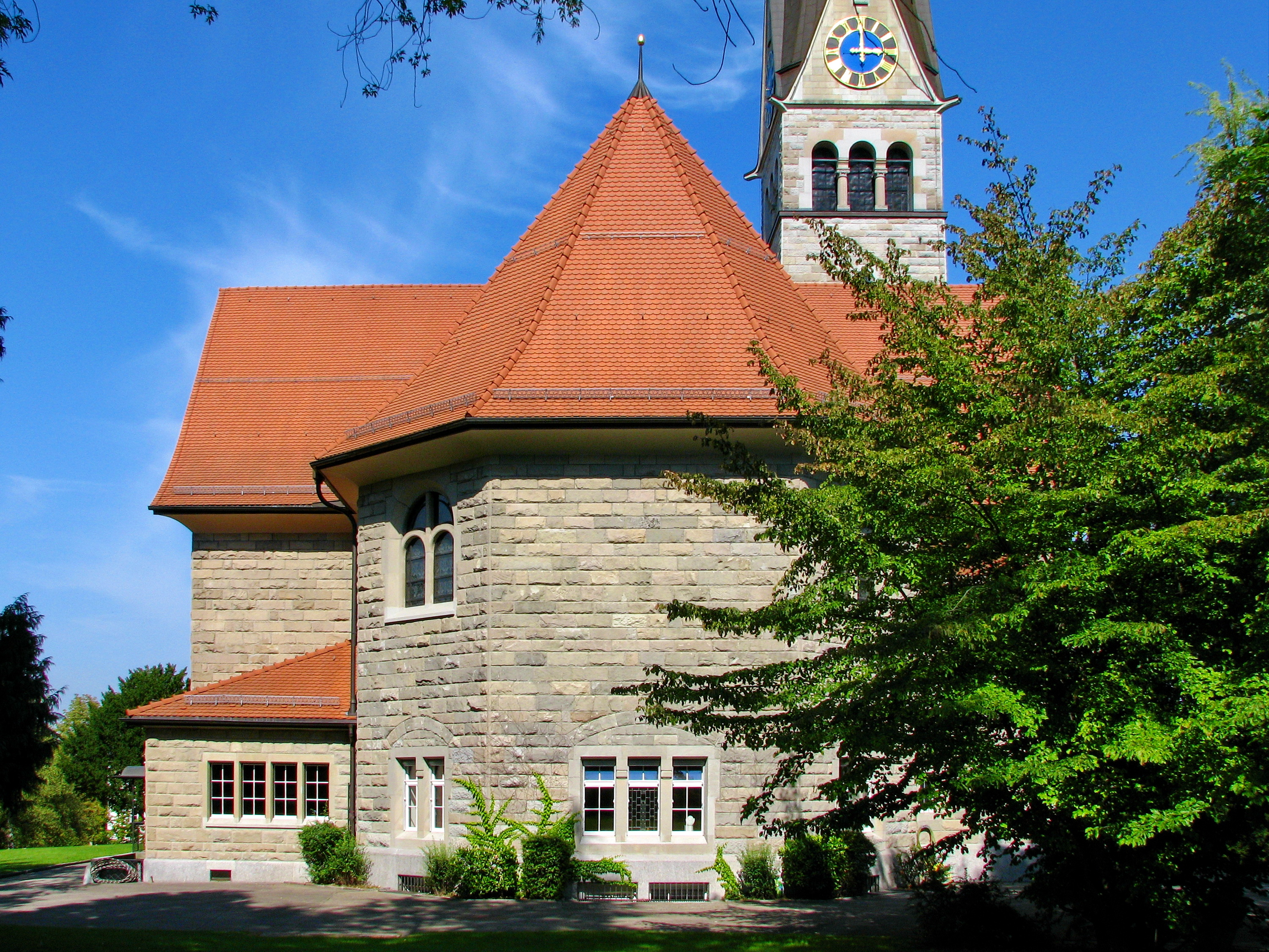 Reformed Church in Zürich-Oerlikon (Switzerland)